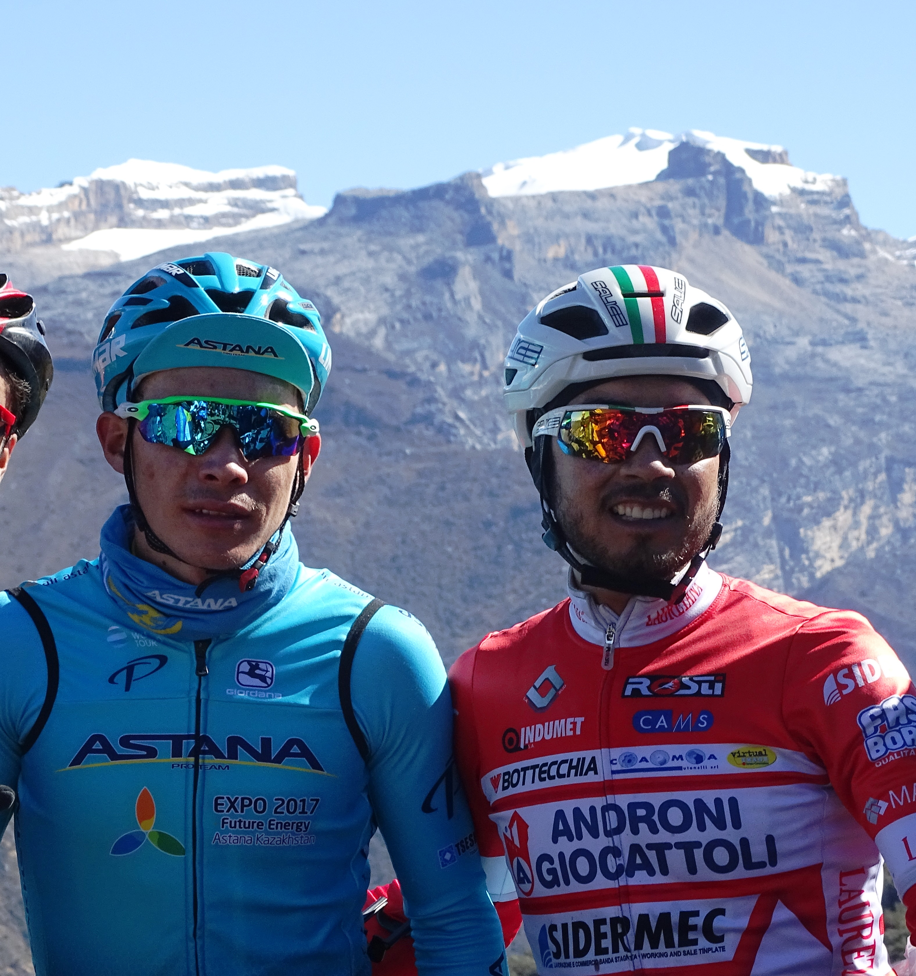 Miguel Angel Lopez y Rodolfo Torres en enero de 2018, El Cocuy, Boyacá, Colombia